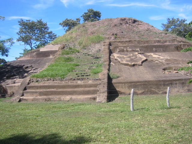 Vista hacia el norte de la Estructura 5. Departamento de Arqueología de CONCULTURA.